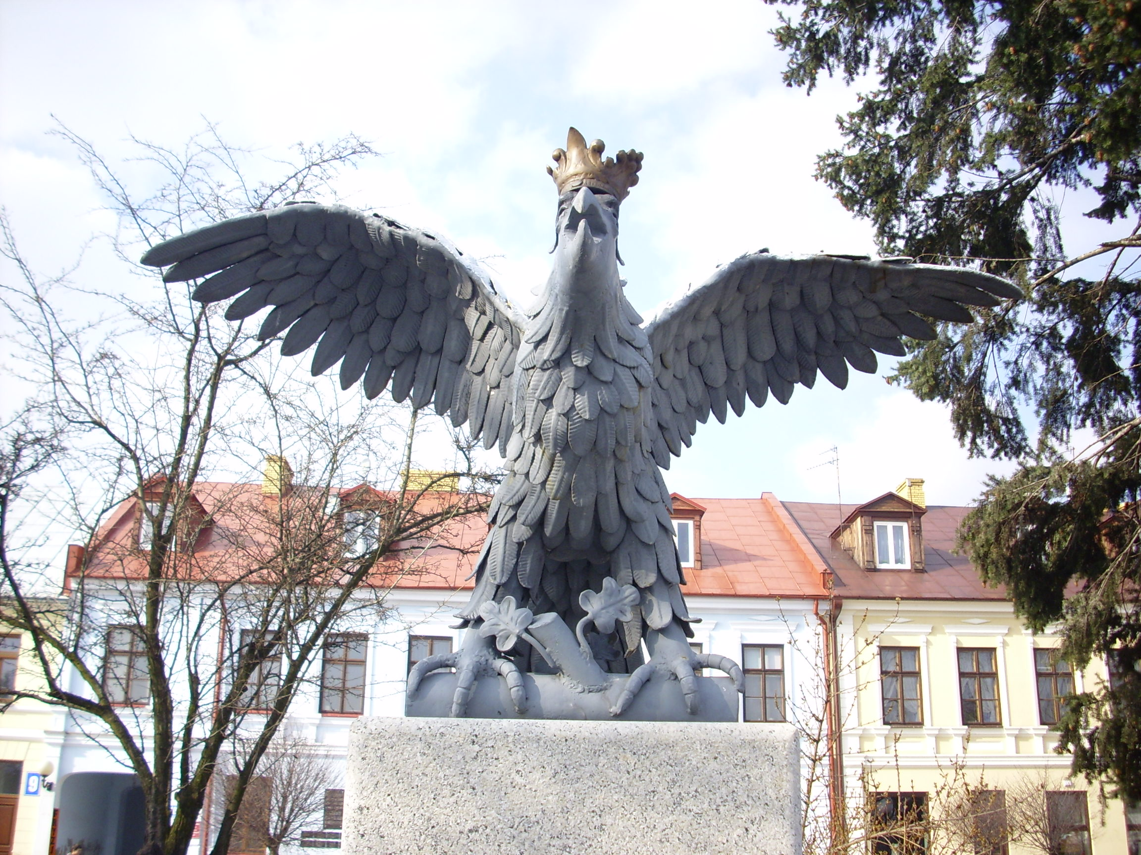 Biała Podlaska (PL), pl. Wolności (Rynek). Pomnik orła.